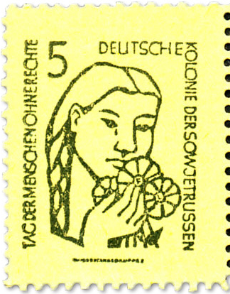 Briefmarkenfälschung des Fälschers W.P. Kleine, 1956